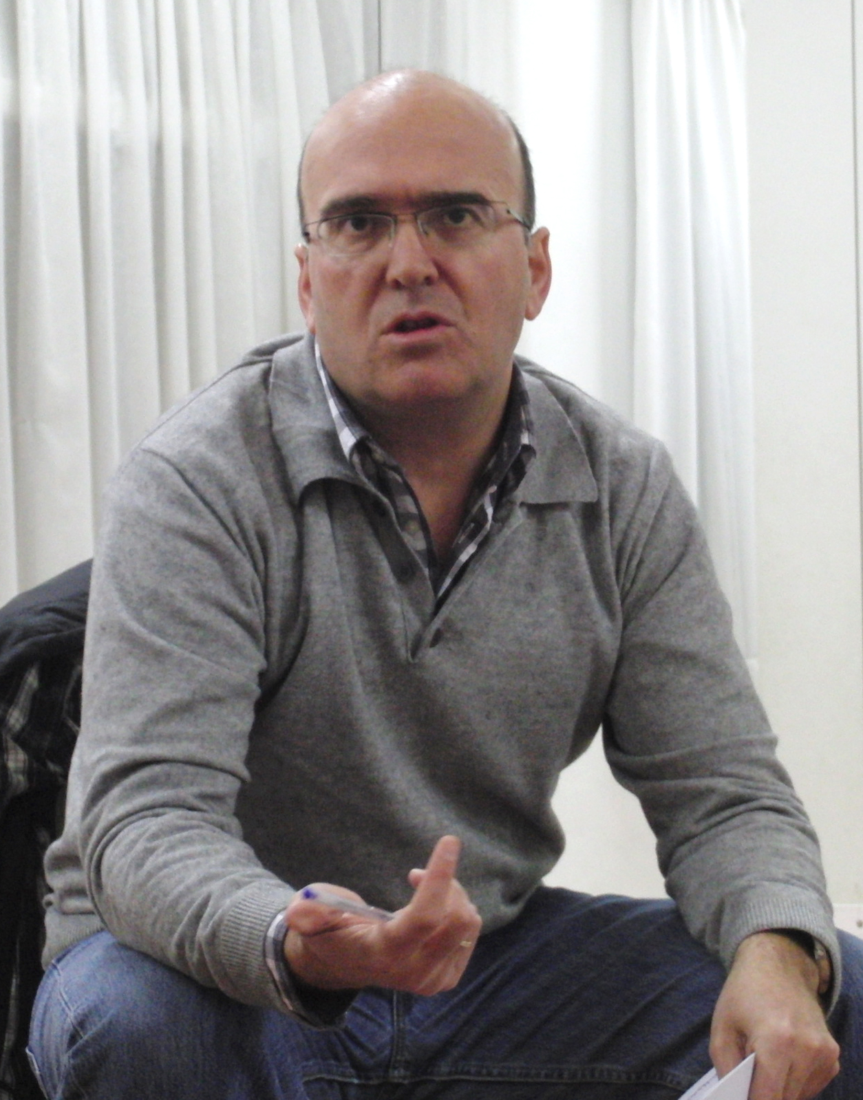 Aingeru Epaltza, Uribe Kostako irakurzaleen txokoan, "Izan bainintzen Nafarroako Errege" eleberriari buruzko solasaldian.